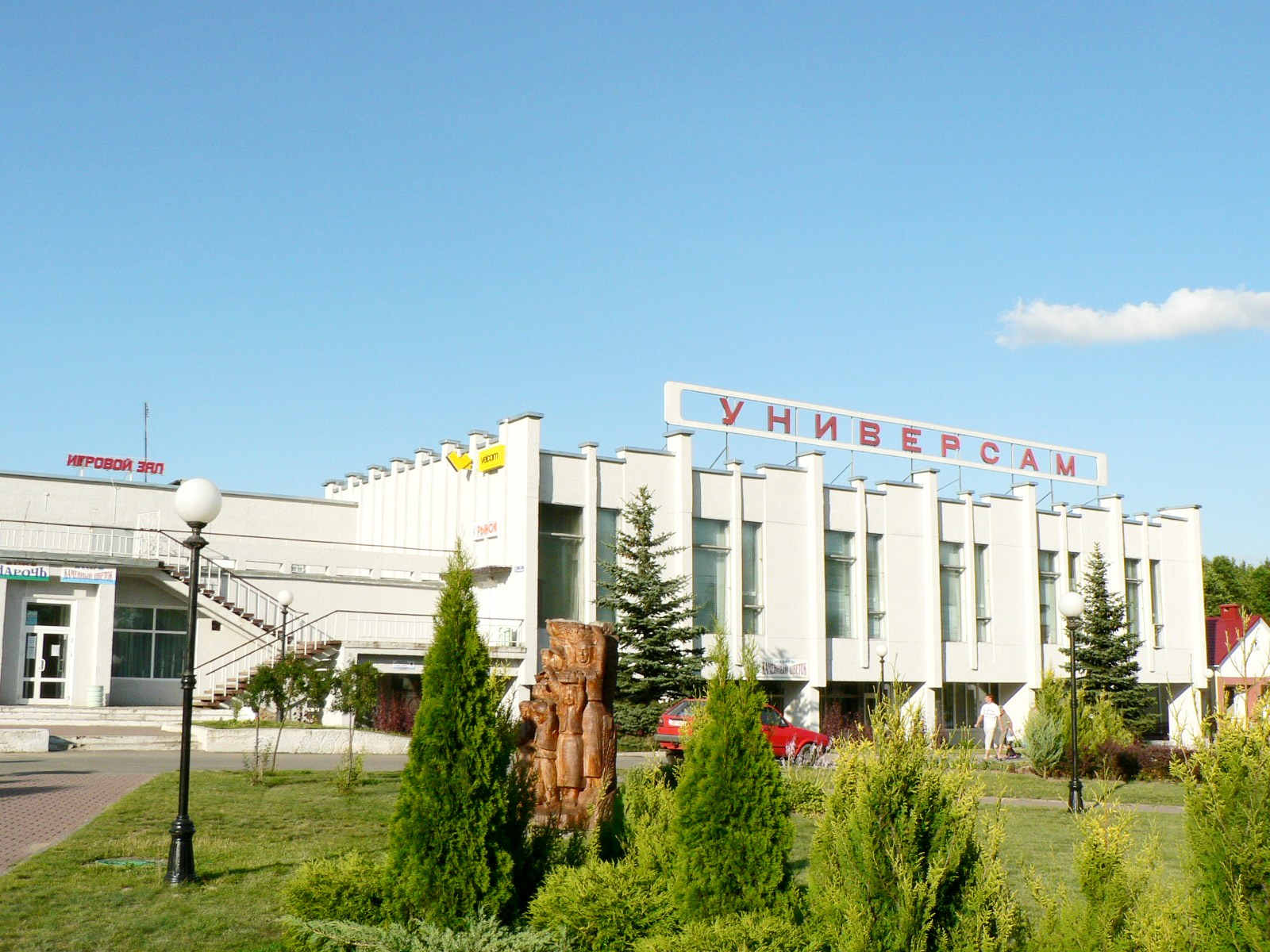 Kompleks usługowo-handlowy przy głównym placu w Kupie. Беларуская (тарашкевіца): Паслугова-гандлёвы цэнтр ля галоўнай плошчы ў Купе.